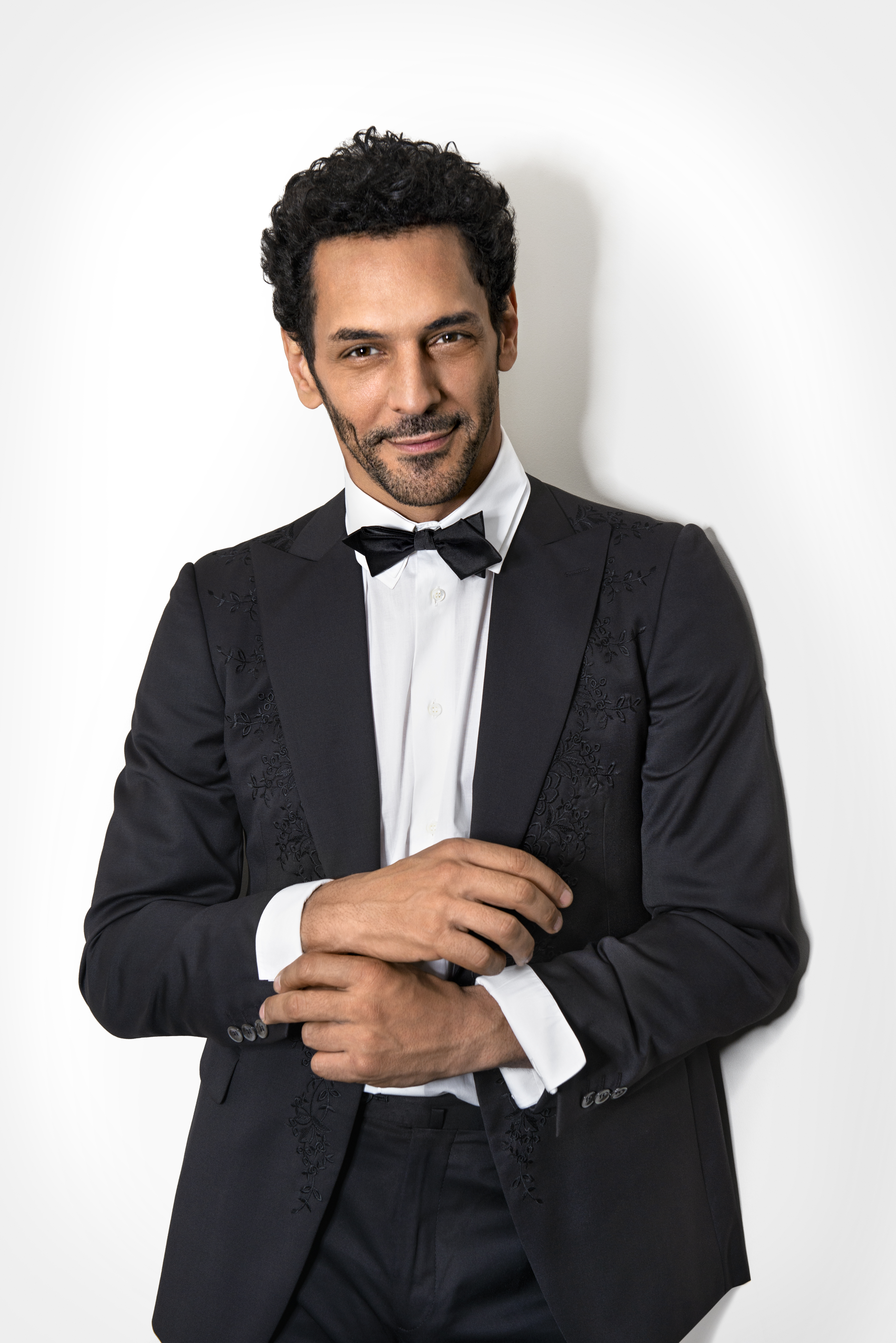 Tomer Sisley lors du Festival du film à Cannes 2019 posant dans la suite Sandra and Co pour un shooting organisé par Gil Zetbase